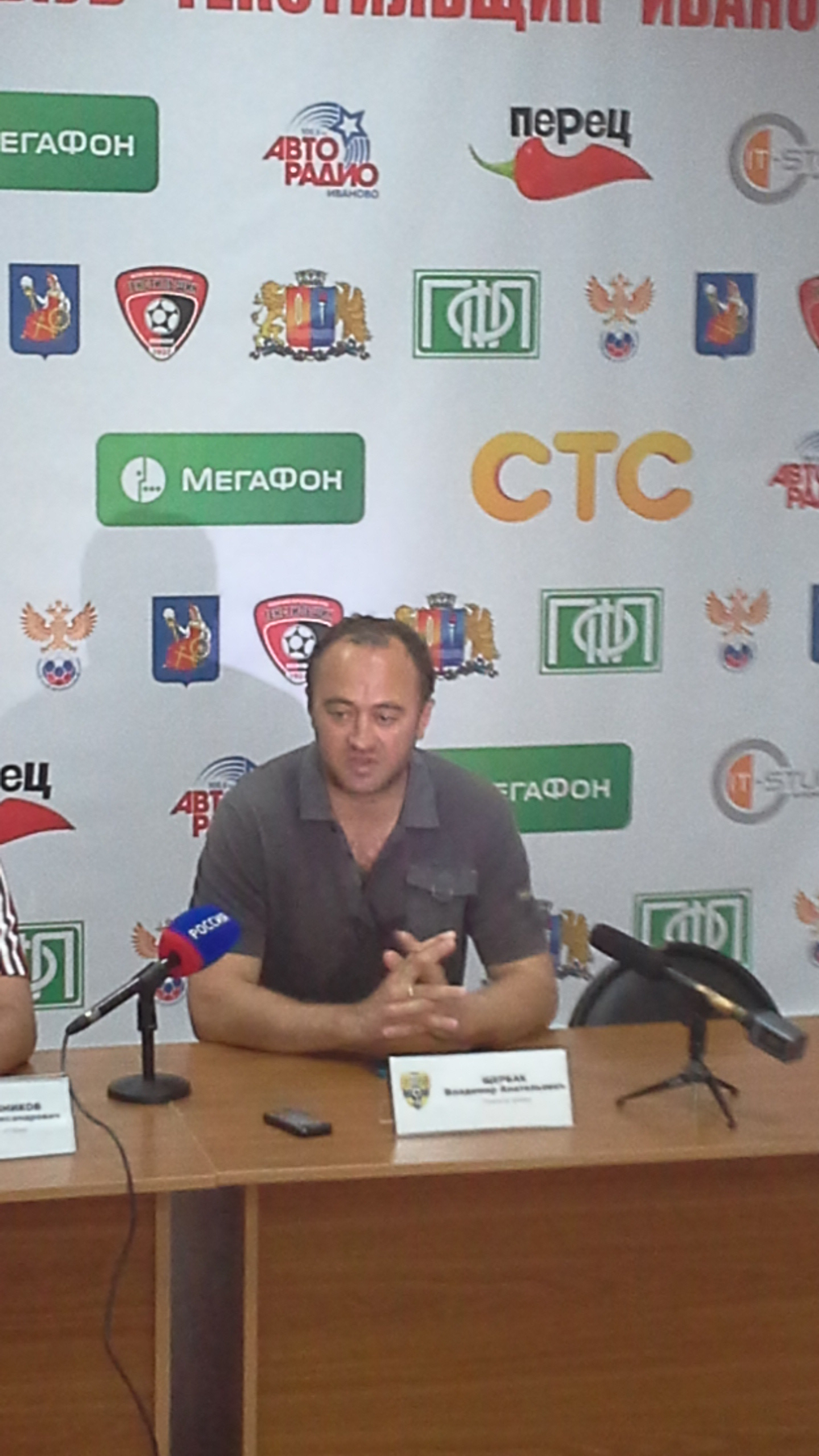 Владимир Щербак